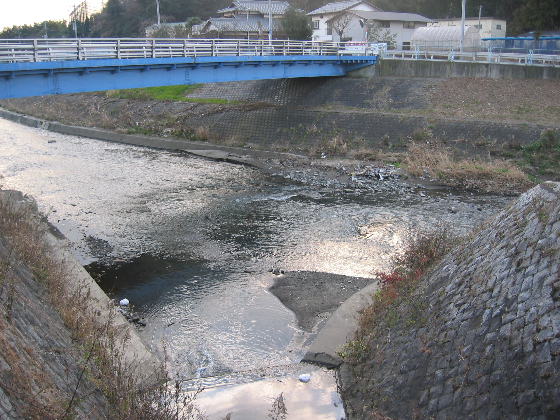 2004年12月28日、利用者自身の撮影。